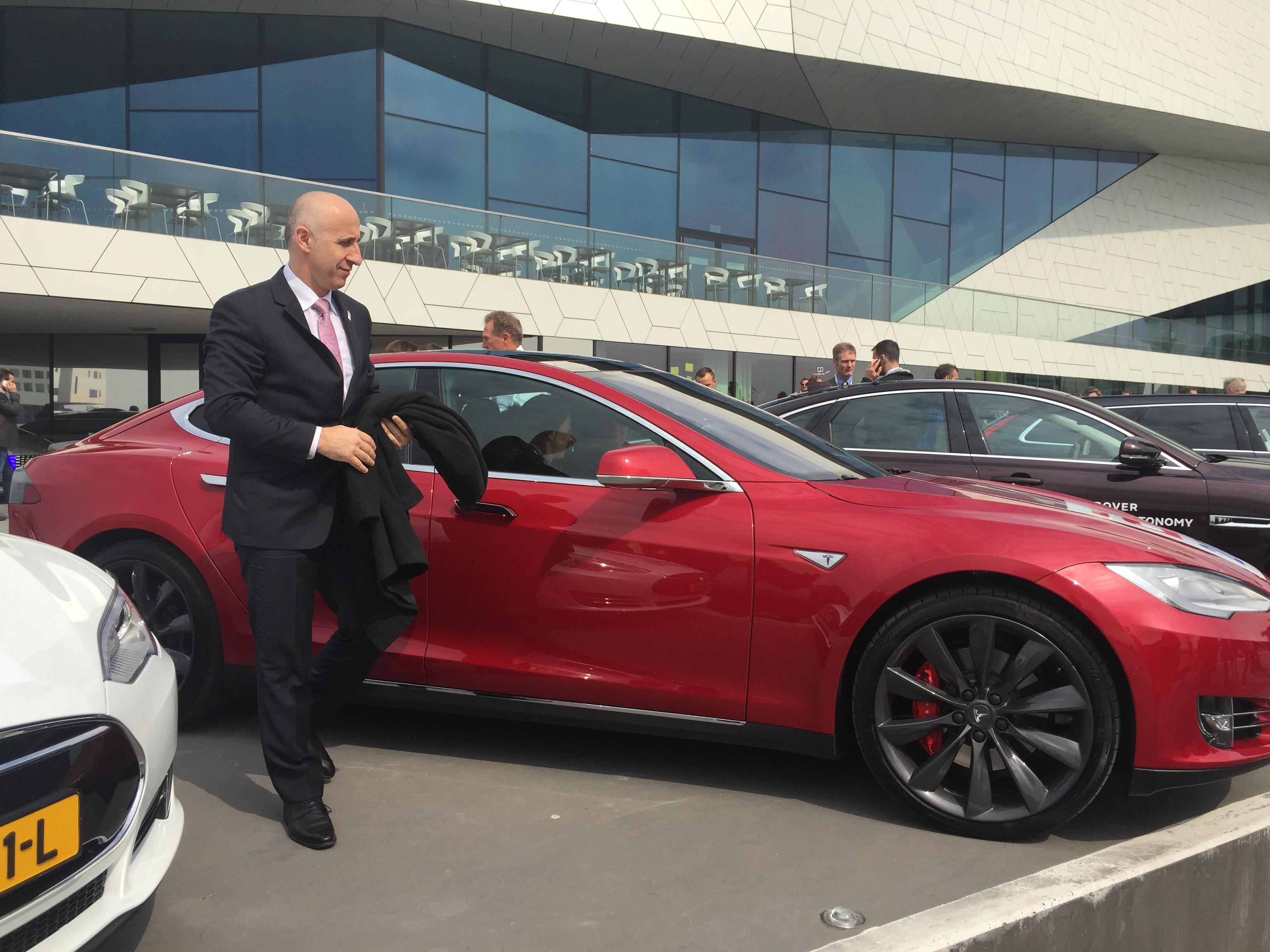 După drive-testul cu mașina autonomă, capabilă să negocieze singură virajele și să mențină distanța față de vehiculele din trafic